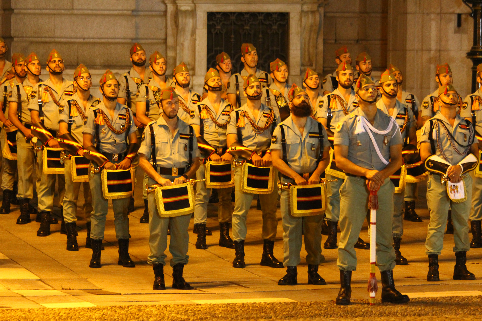 Retreta Militar en la Plaza de Oriente de Madrid, junto al Palacio Real, el 11 de octubre de 2014, víspera del Día de la Fiesta Nacional de España.